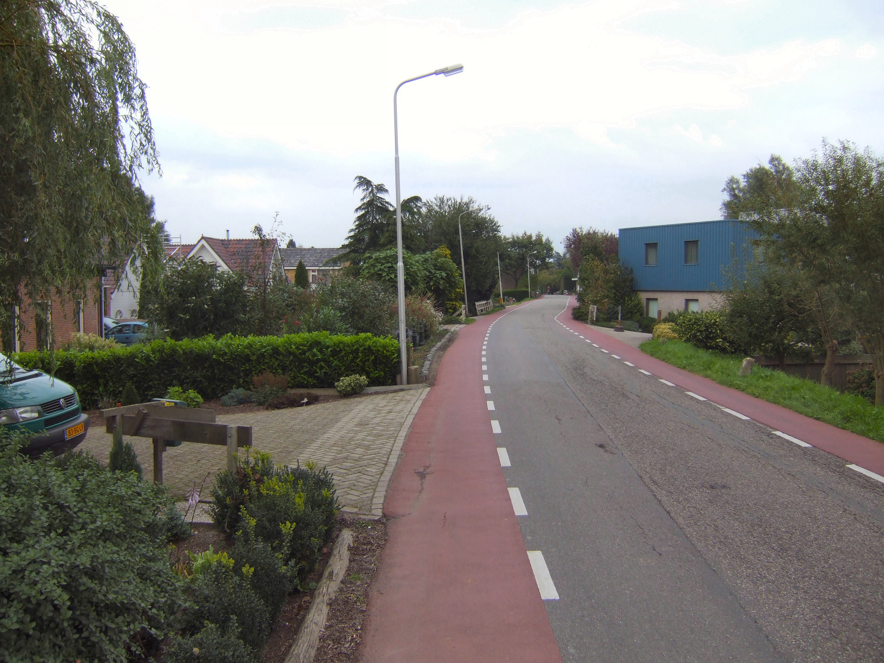 Lageweg